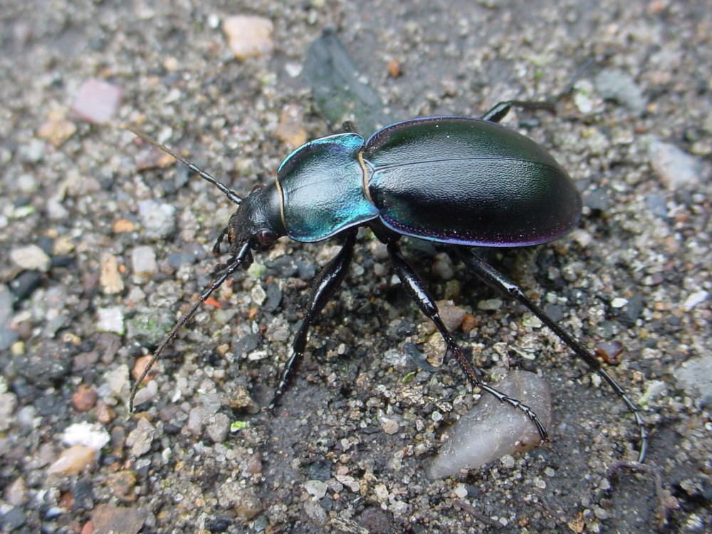 střevlík